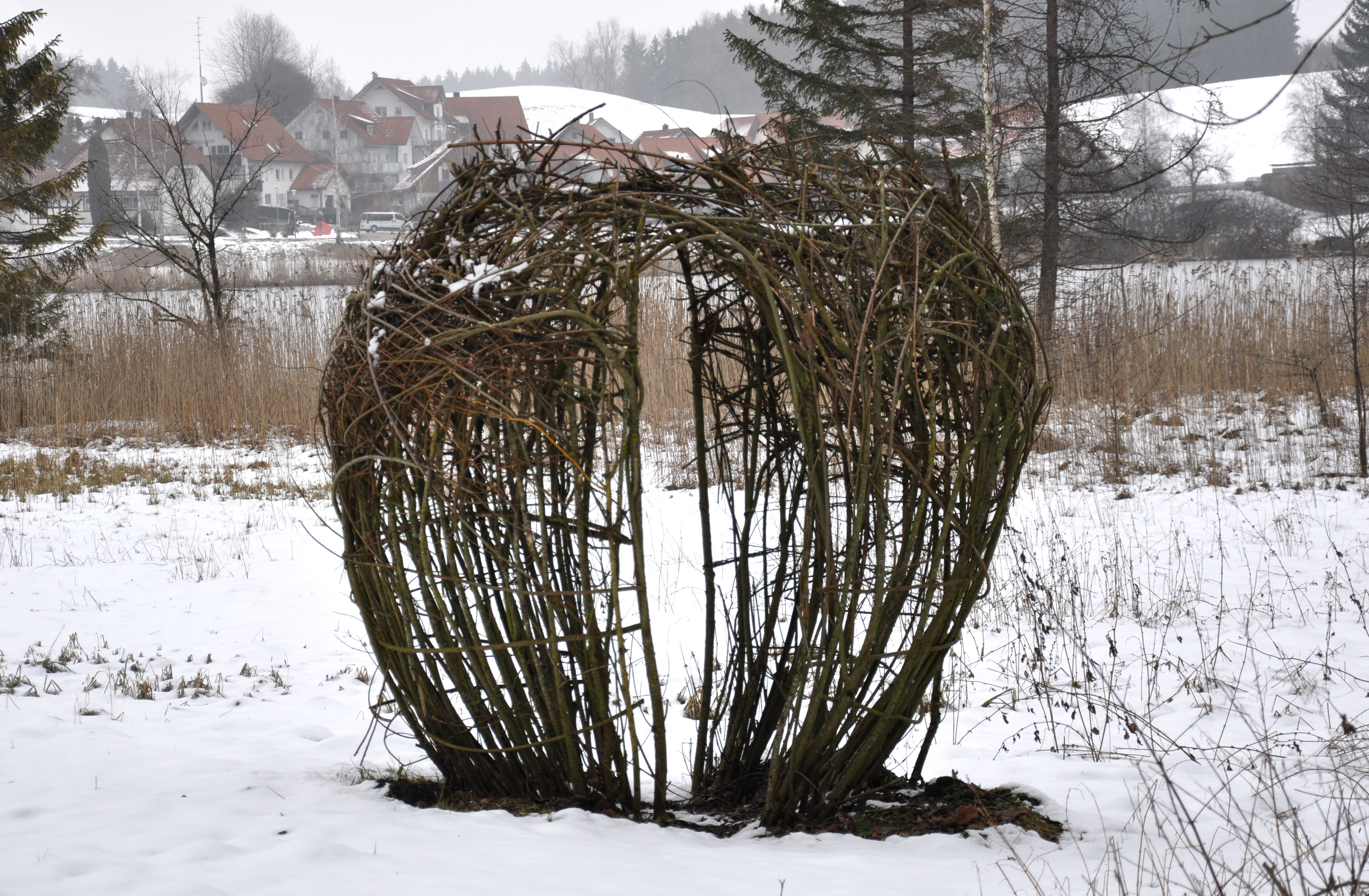 Skulpturenweg Karsee in Karsee, Stadt Wangen im Allgäu Caroline Laengerer: Poygonum-Kugel, Weide, 2002 (Originalzustand siehe: Bild)